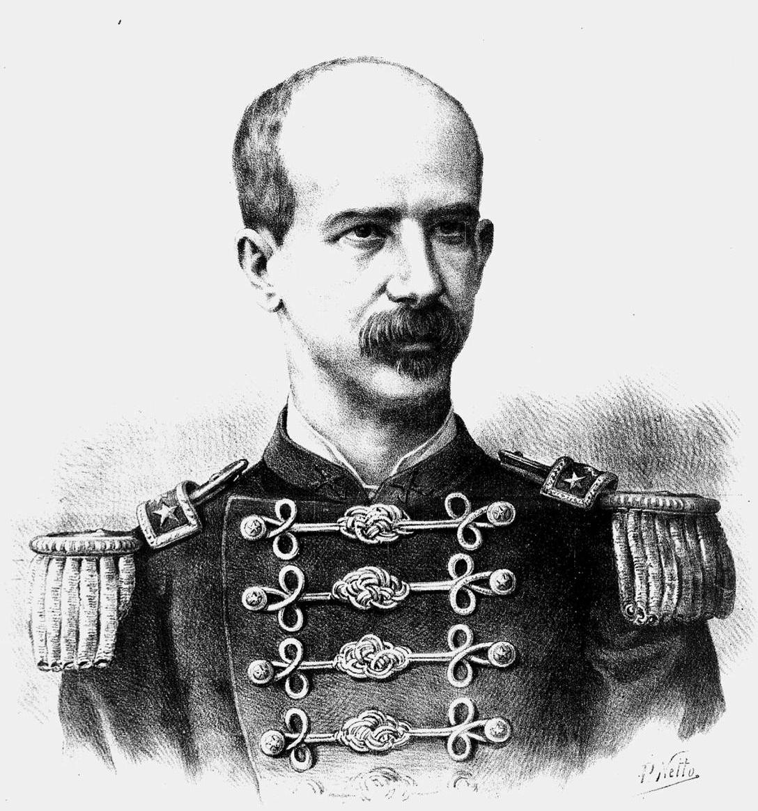 Coronel Moreira Cesar